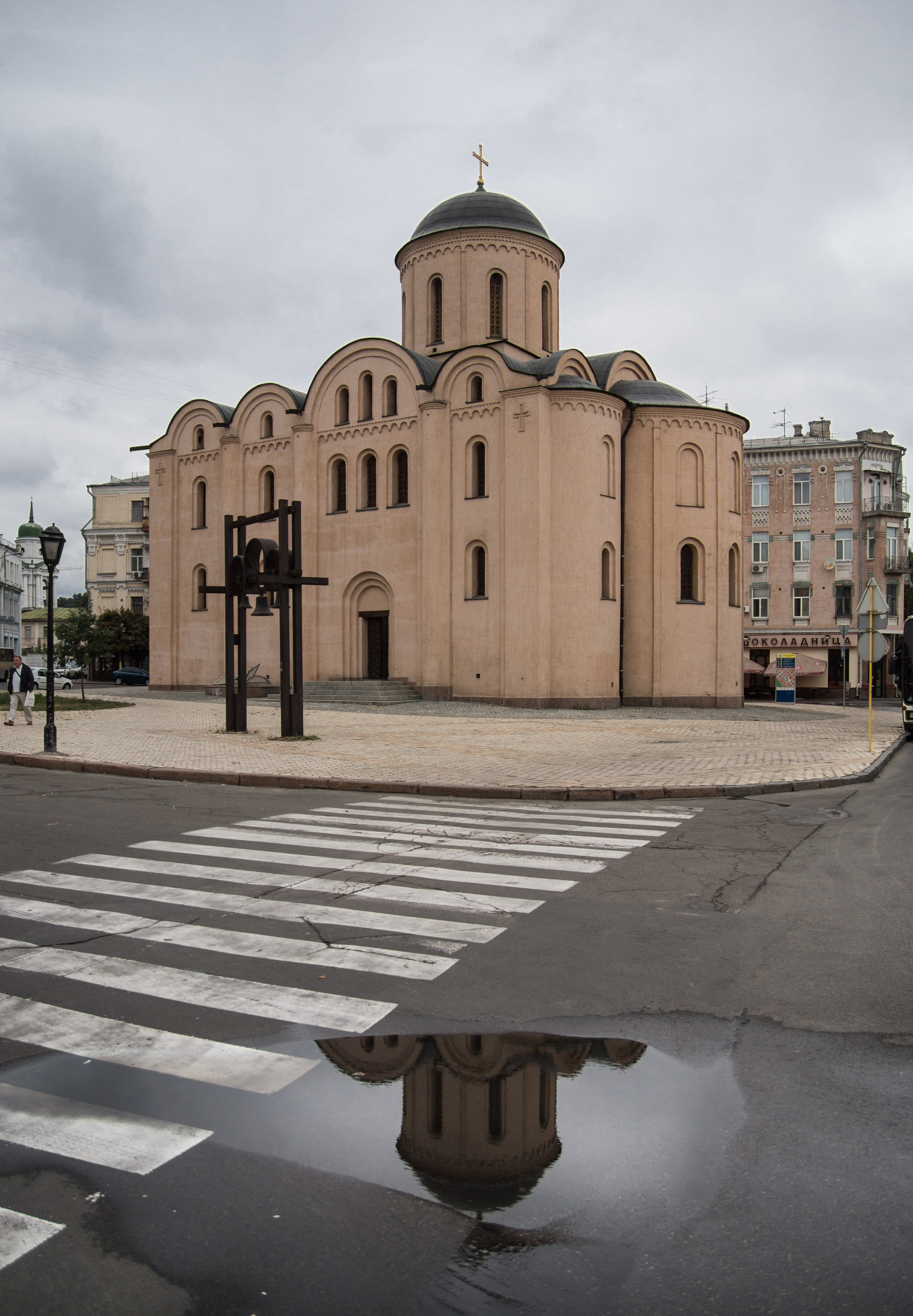 Iglesia de Nuestra Señora